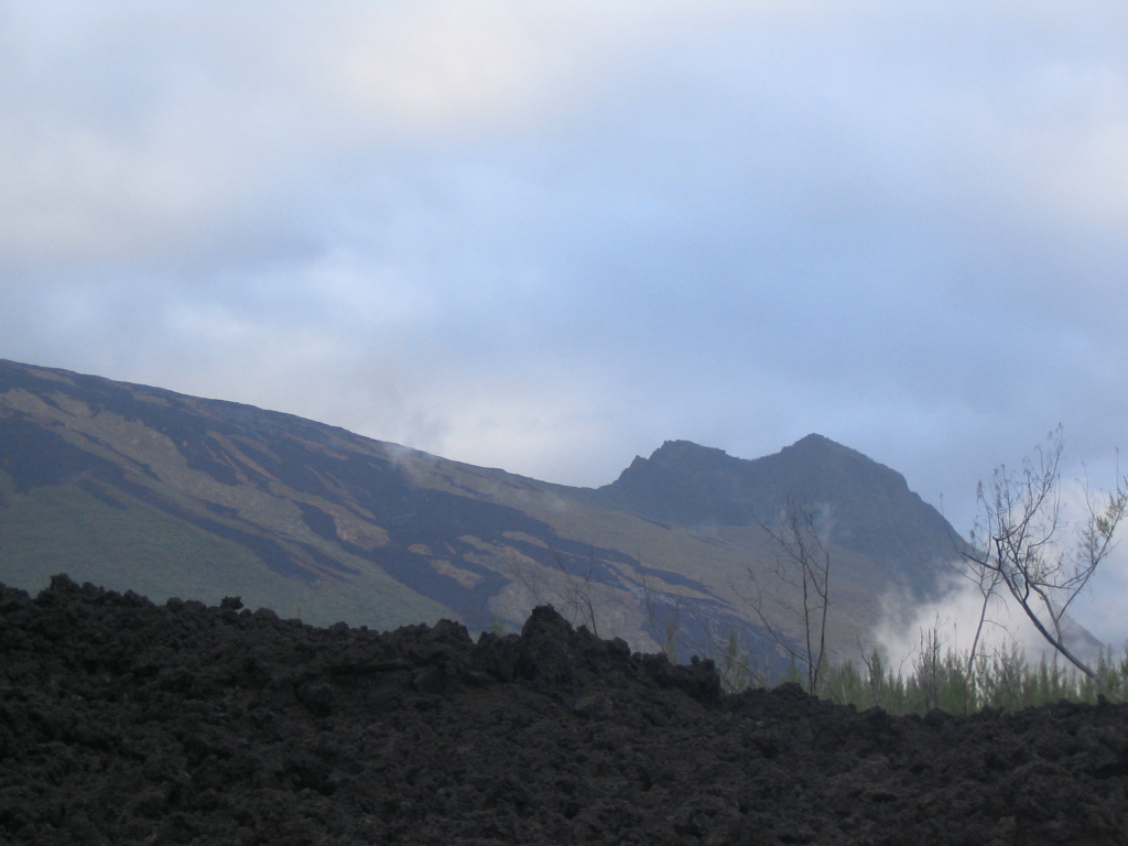 Les grandes pentes, dans l'enclos du Piton de la Fournaise, Réunion own work